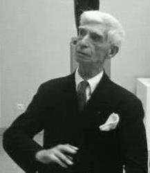 Ossip Zadkine, Frans-Russisch beeldhouwer.